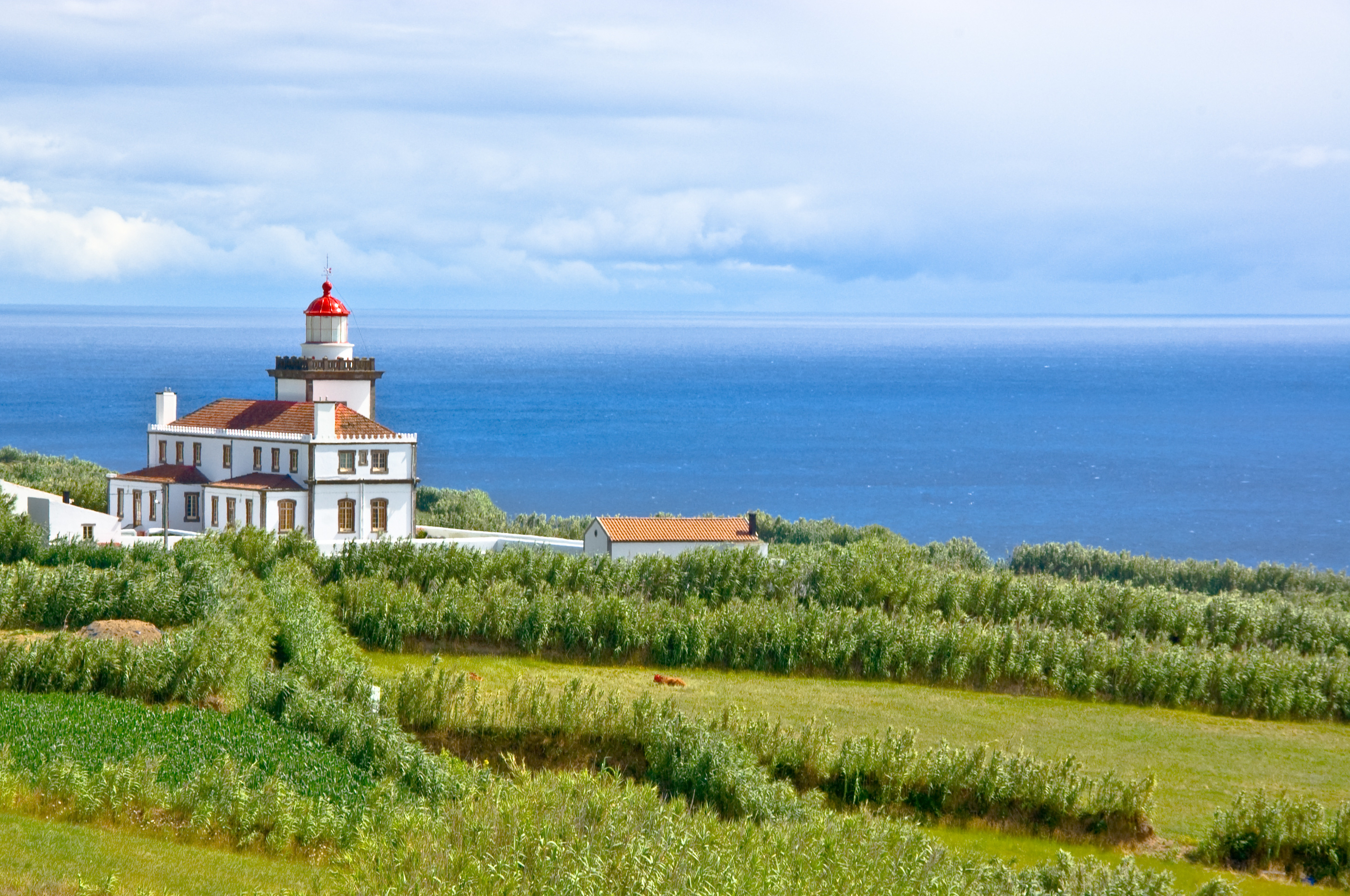 São Miguel island, Azores, Portugal.